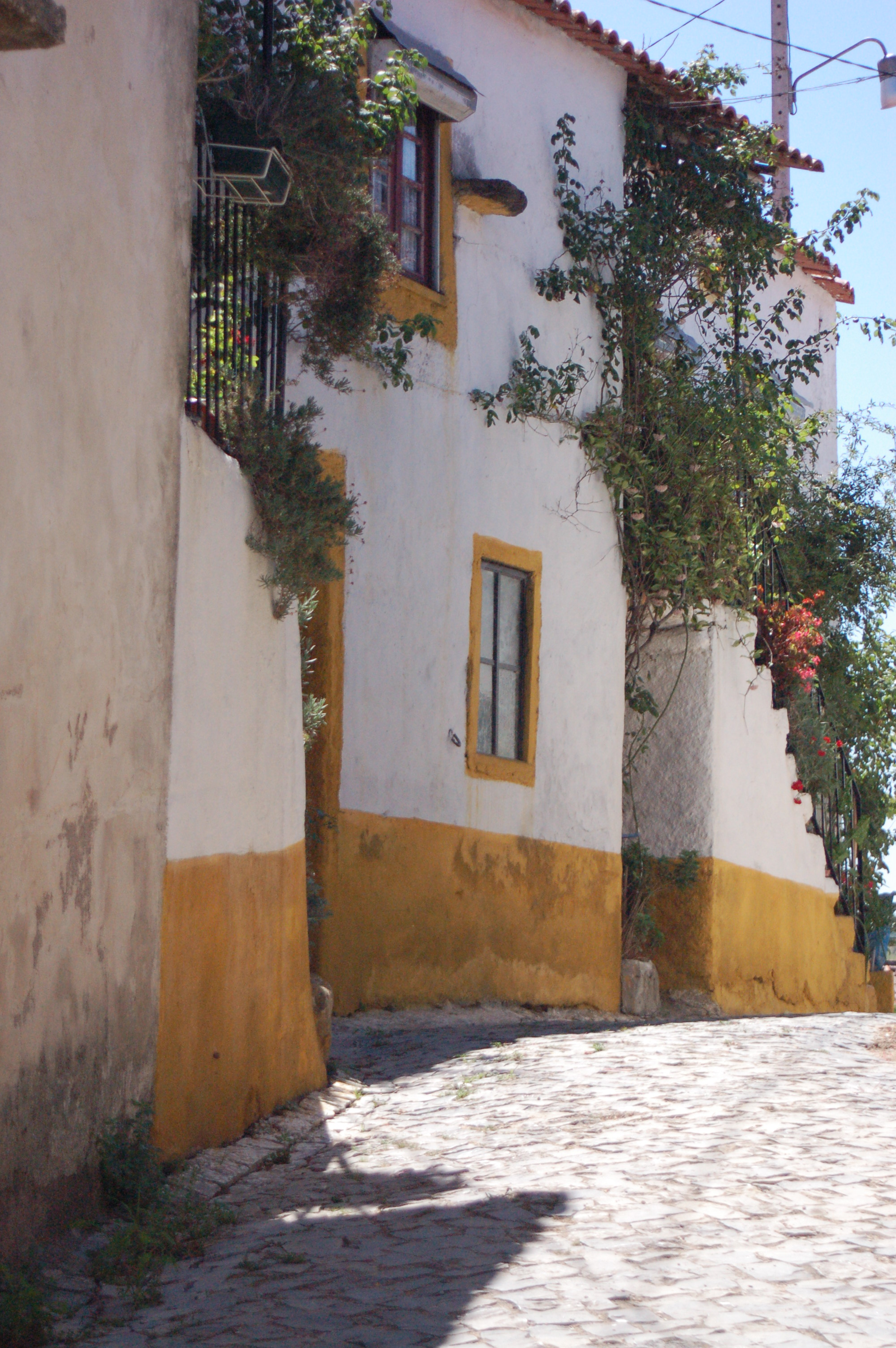 Rua em Torre de Bera, Almalaguês, Coimbra, Portugal